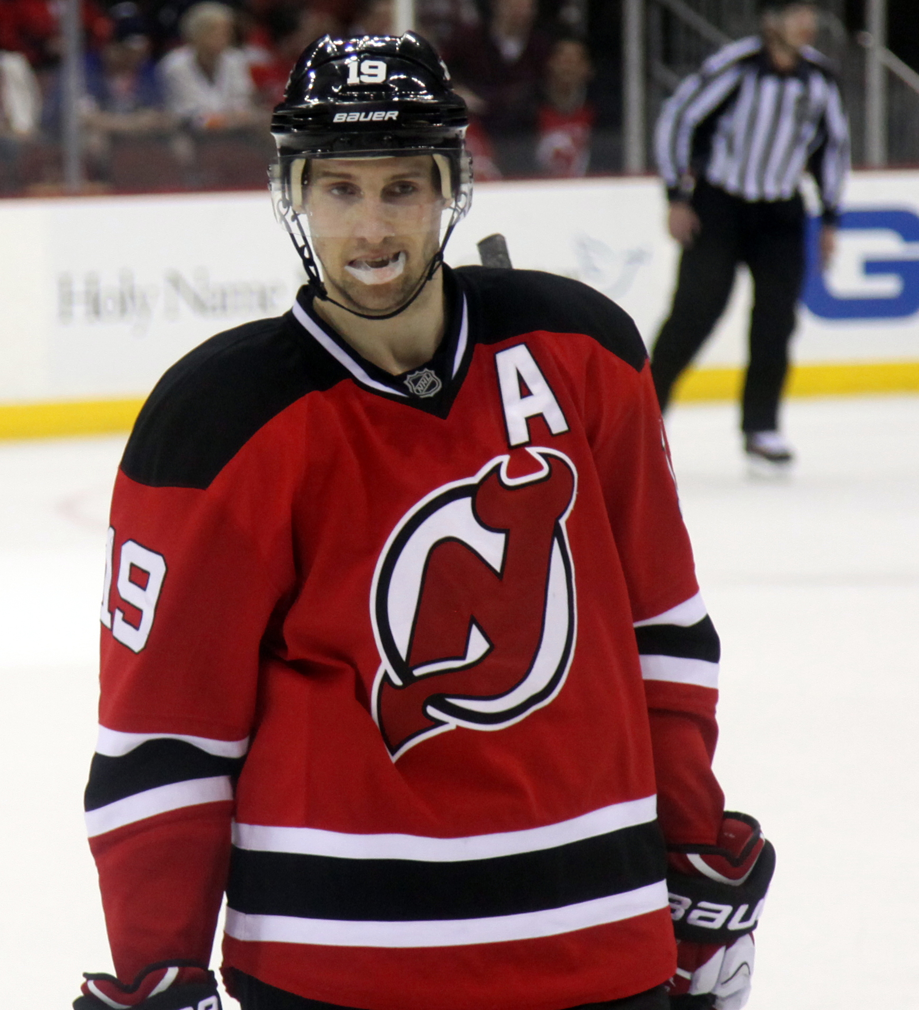 Zajac in 2014.